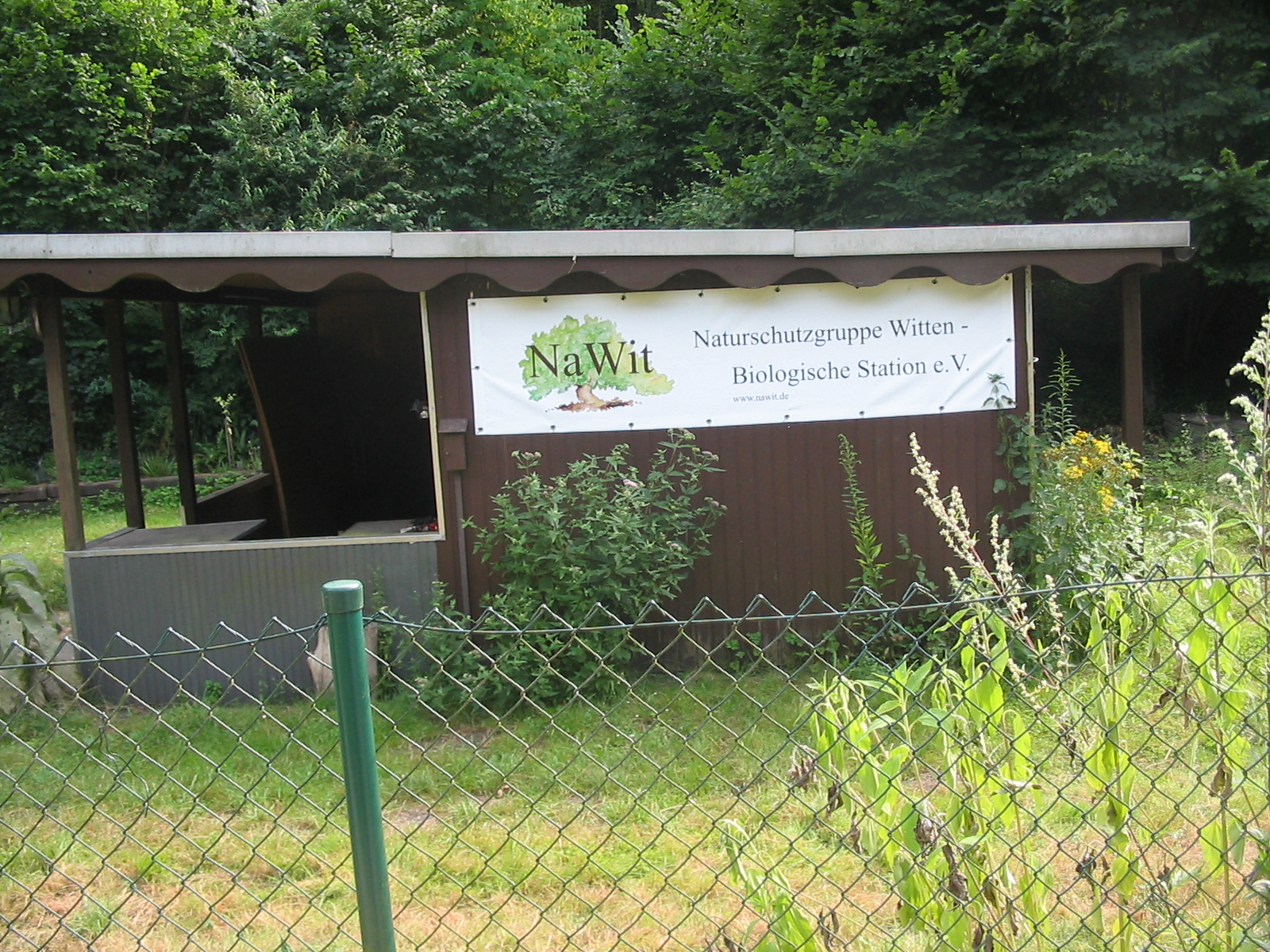 Außenstation Biologische Station Witten der Naturschutzgruppe Witten in Witten-Bommern